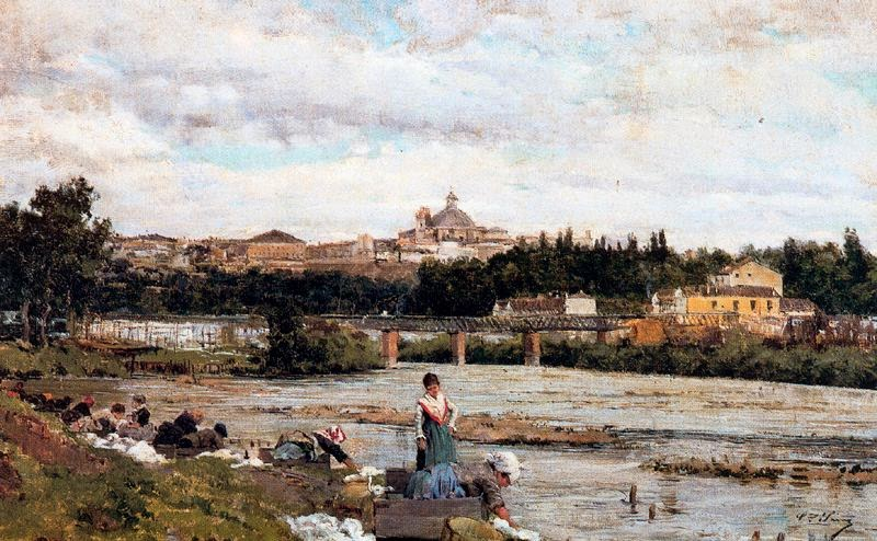 Óleo de Casimiro Sainz, dentro de la serie dedicada a las lavanderas y las orillas del río Manzanares de Madrid. Colección particular.